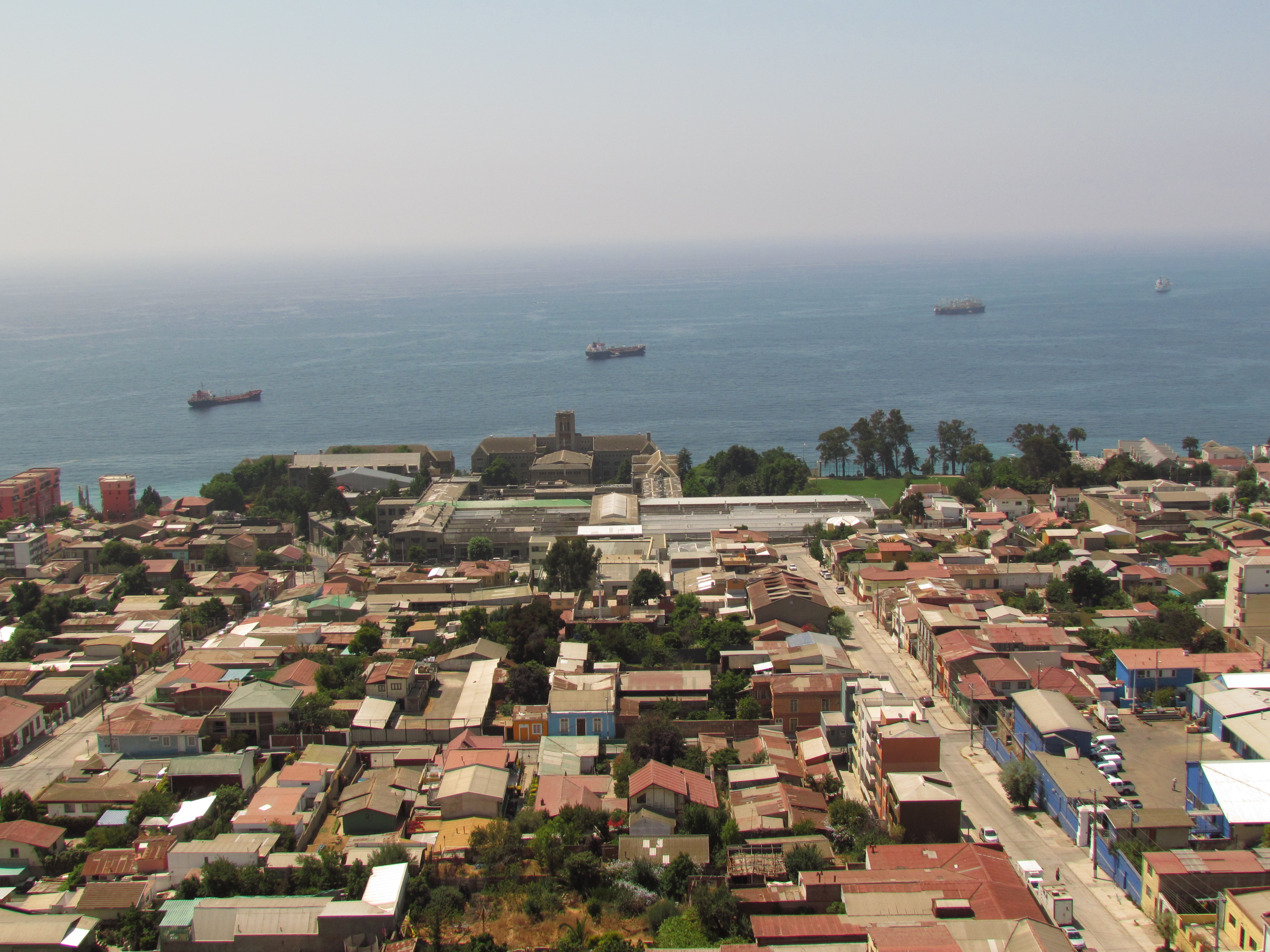 Cerro los Placeres, Valparaiso.